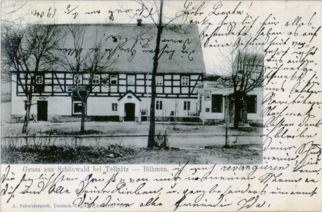 Hostinec U Říšské orlice (Zum Reichadler) v obci Schönwald (dnešní Krásný Les, který je součástí obce Petrovice) čp. 175, který byl zbořen roku 1952. Světlotisková pohlednice byla vydaná K. Swidernochem ve městě Deutsch-Wagram a odeslána v roce 1904.